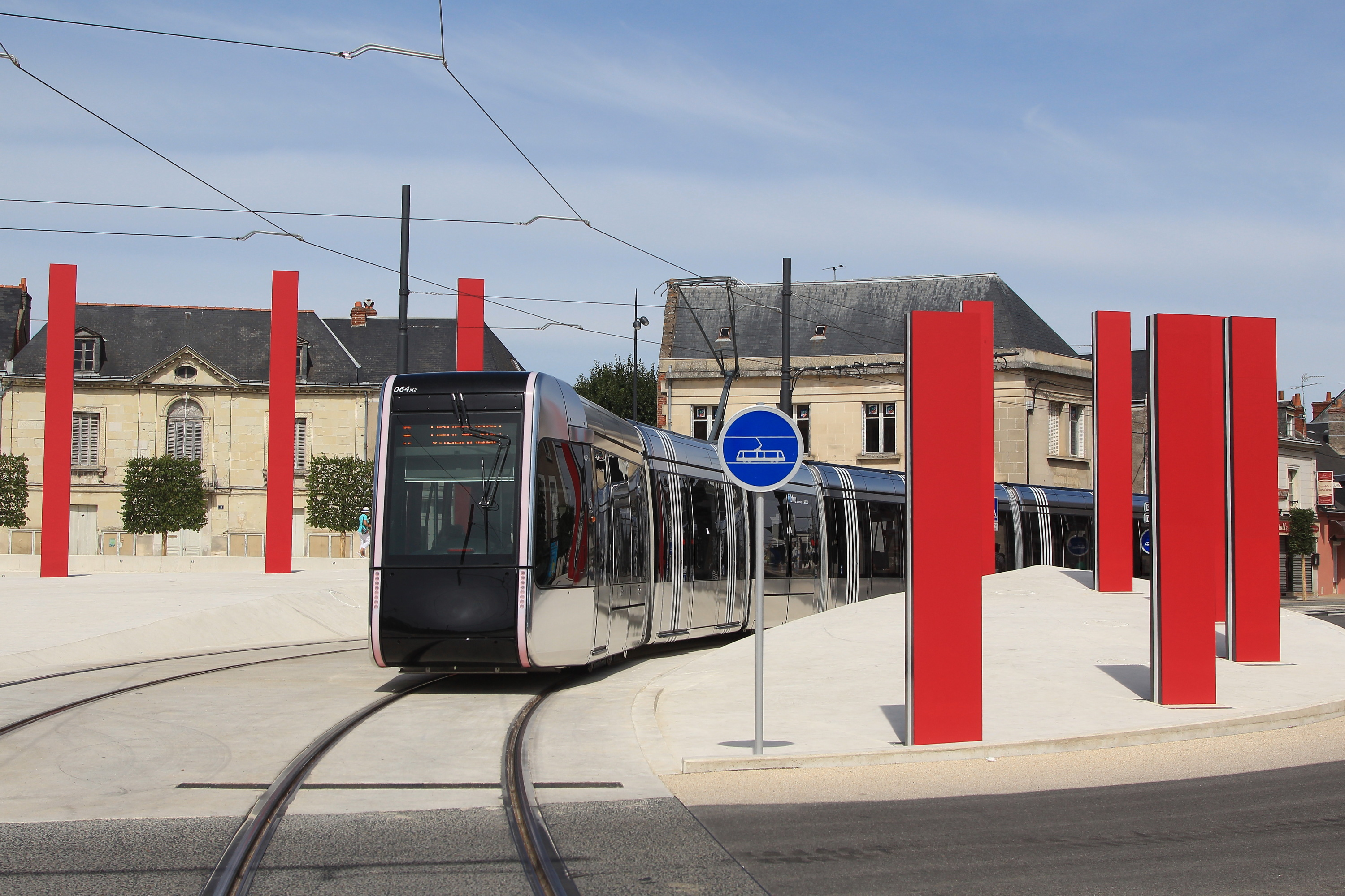 La rame du tramway de Tours n°64 arrive à la station "Tranchée" et passe entre les colonnes de Burens.